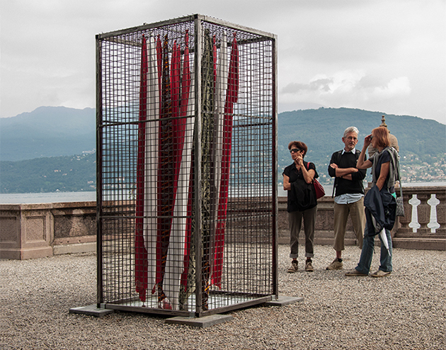 Spiriti Evocatti/ Lampedusa, 2014, Außenskulptur, Isola Bella/ Lago Maggiore